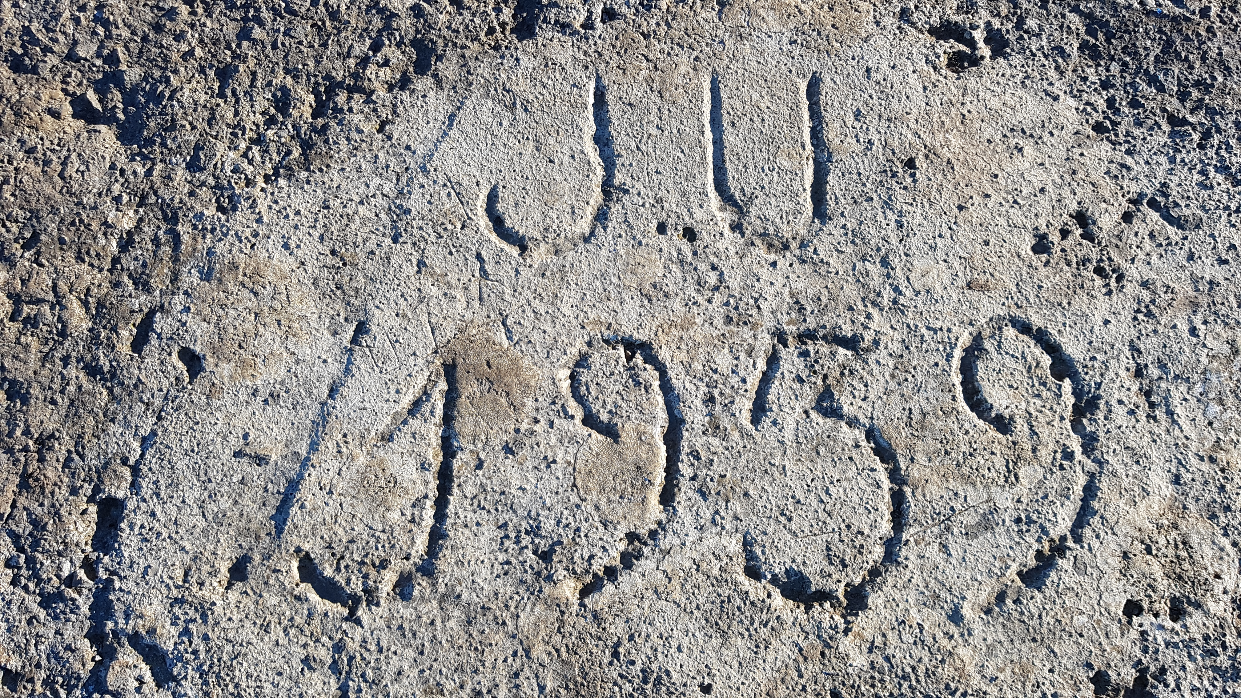 Buruntzako zementuzko bankuko inskripzioa "ju 1939"